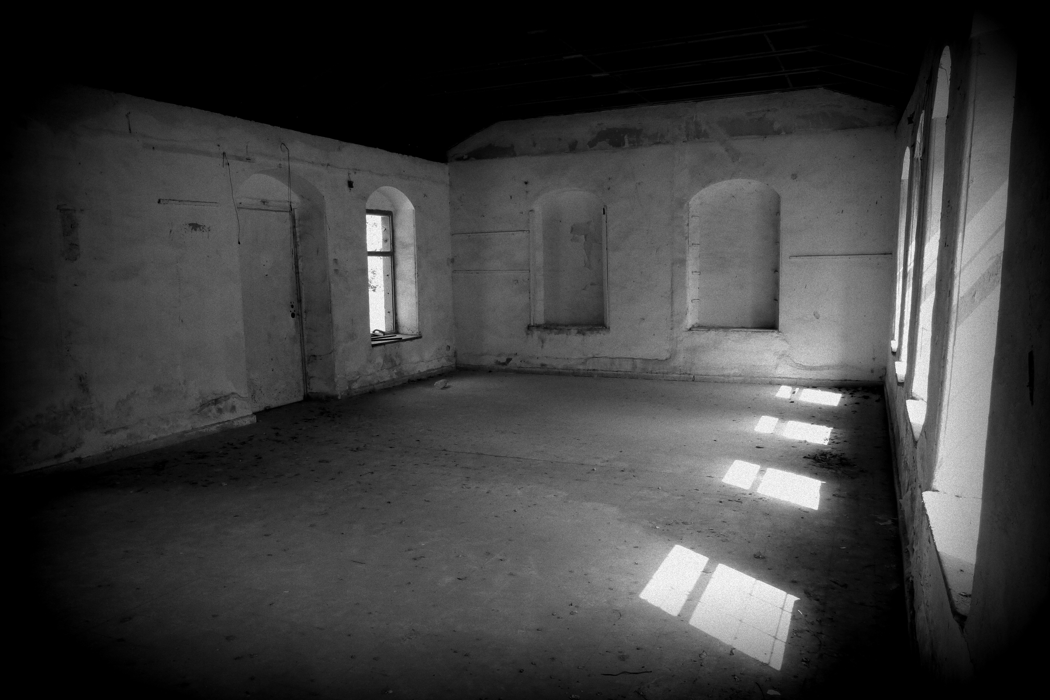 ביתם של מינה בנימין פוקס, מהבתים הראשונים במושבה. מבנה בן קומה שנבנה ב-1888 מאבני כורכר. ב-1970 עבר המבנה לידי "בני ברית" ושימש כמועדון לנוער וקשישים. מ-2004 עומד נטוש ומיועד לשימור כחלק ממתחם המוזיאון לתולדות גדרה.